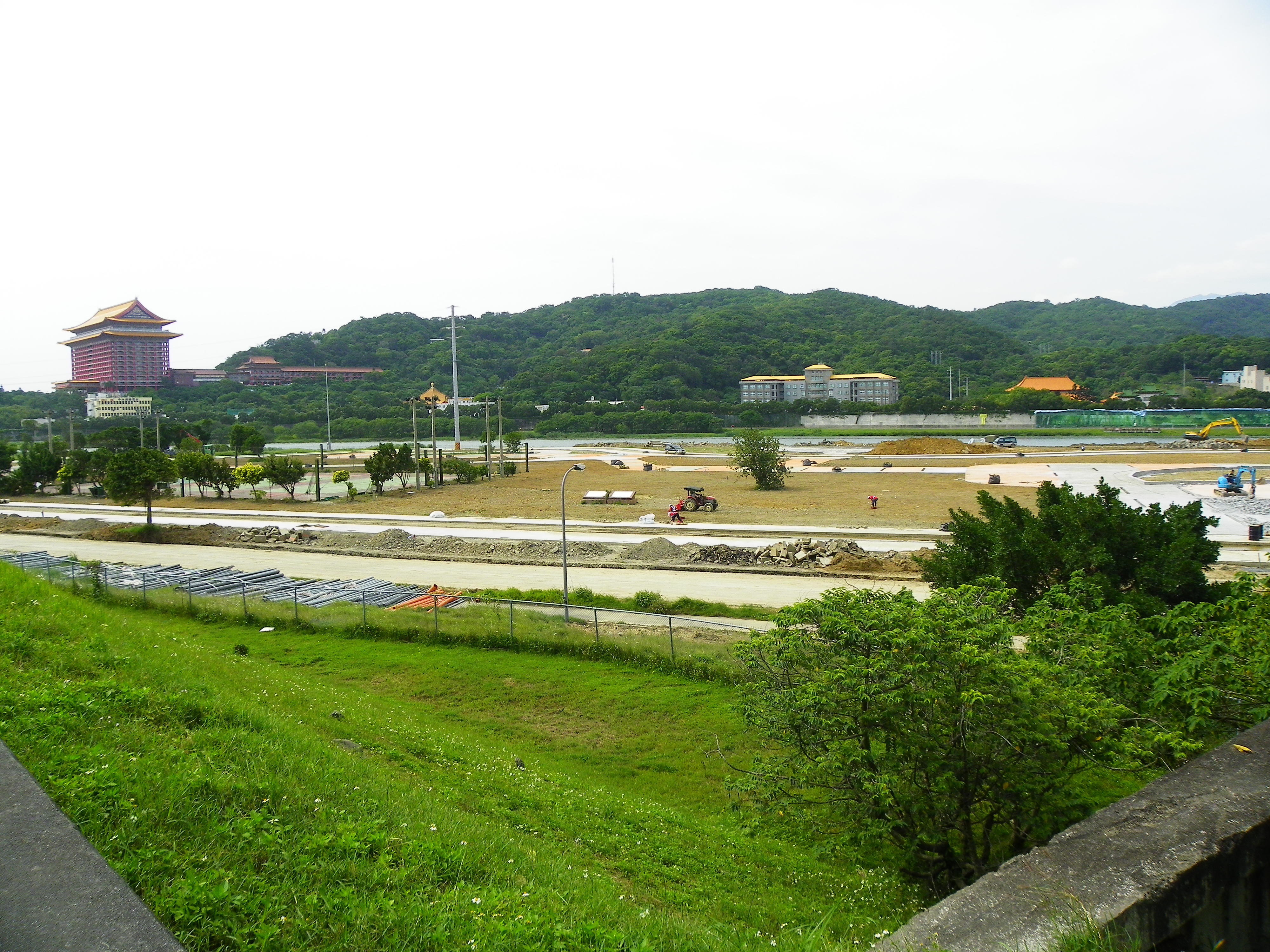 臺北市中山區基隆河北的劍潭山遠景，南岸是2010年臺北國際花卉博覽會準備工事中的大佳河濱公園。 Bân-lâm-gú: Tâi-pak-tshī Tiong-san-khu Ke-lâng-hô pak ê Kiàm-thâm-suann uán-kíng. Lâm-huānn sī 2010-nî Tâi-pak Kok-tsè-hue-hùi Phok-lám-huē tsún-pī kang-sū tiong ê Tua-ka hô-pin-kong-hn̂g.